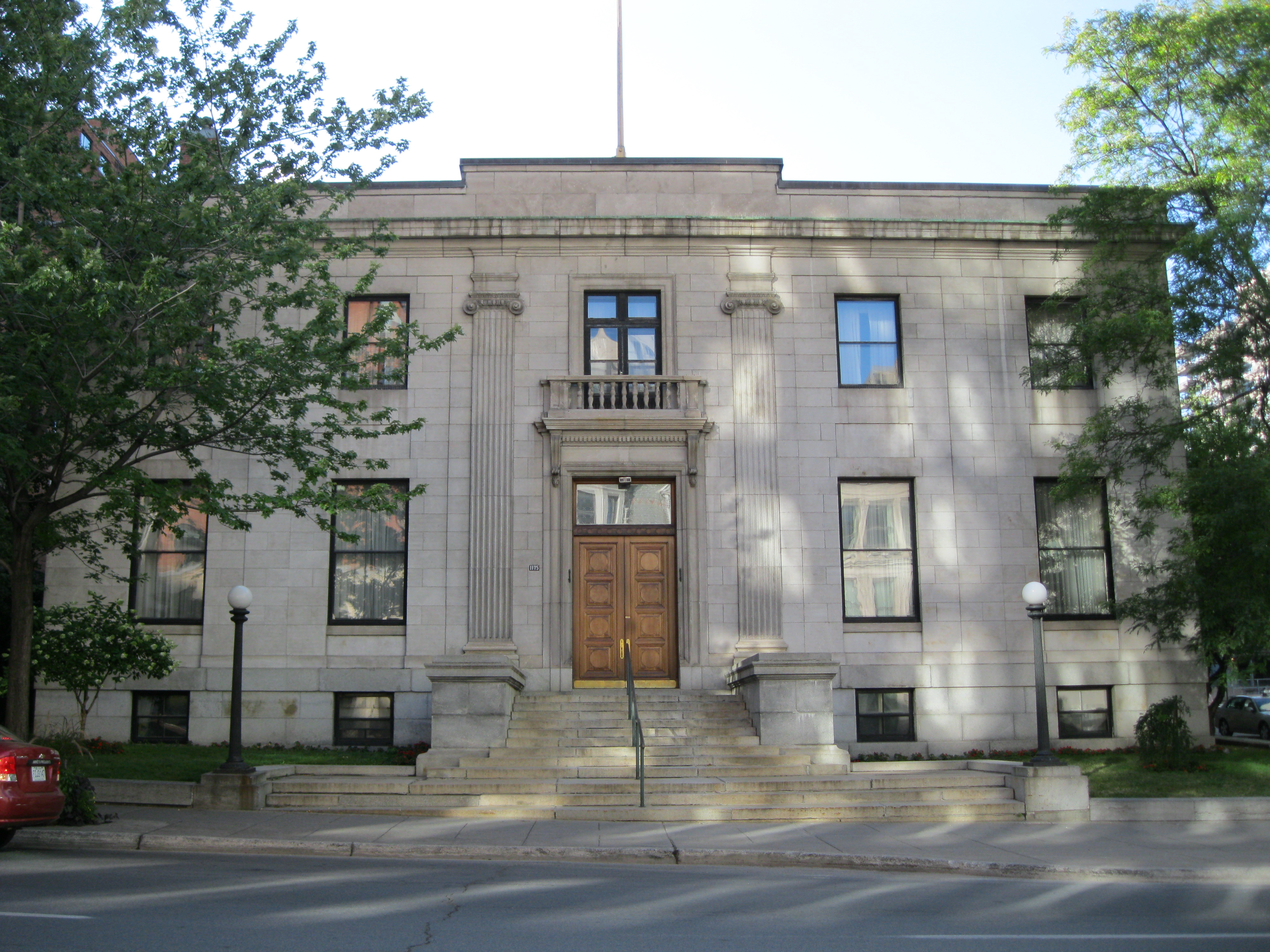 Édifice du Mount Royal Club, 1175, Rue Sherbrooke Ouest, Montréal